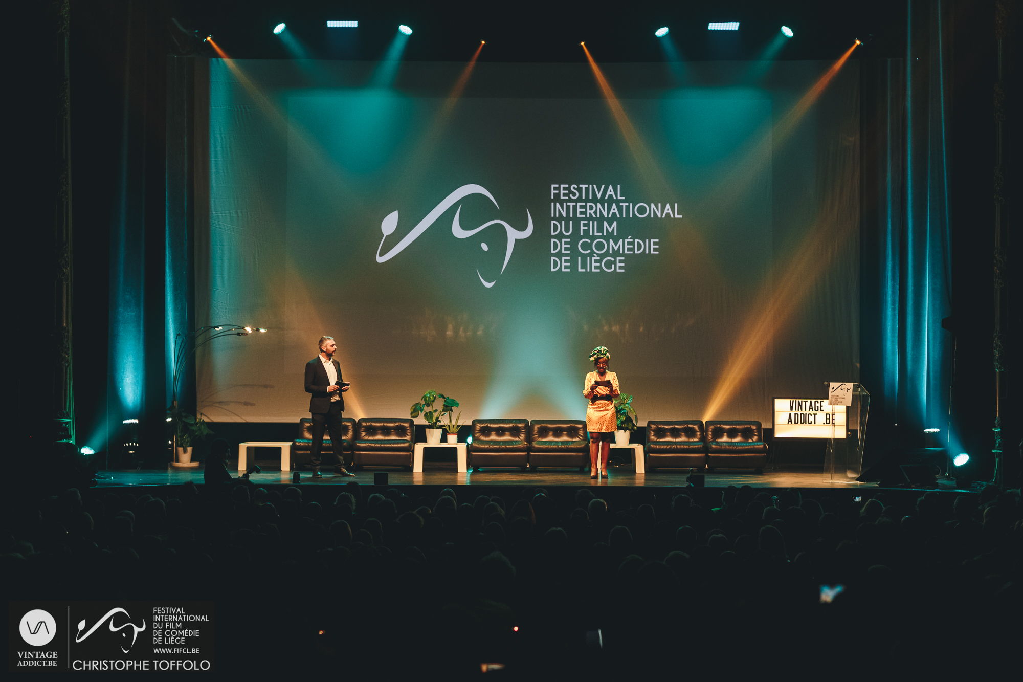 cérémonie ouverture 19